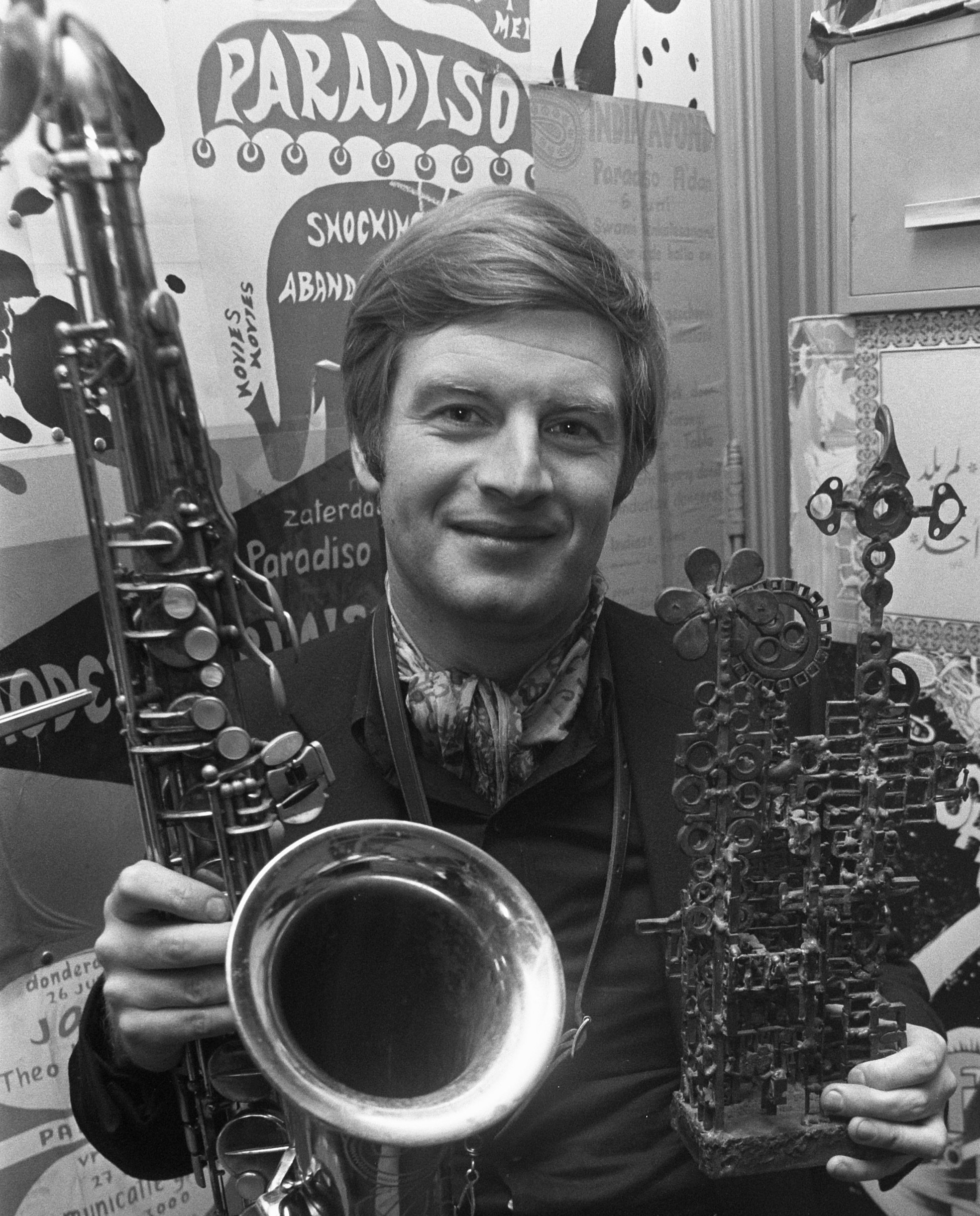 Saxofonist Hans Dulfer kreeg Wessel Ilckenprijs voor prestaties in de jazz in Paradiso Amsterdam. Hans Dulfer met sax en plastiek